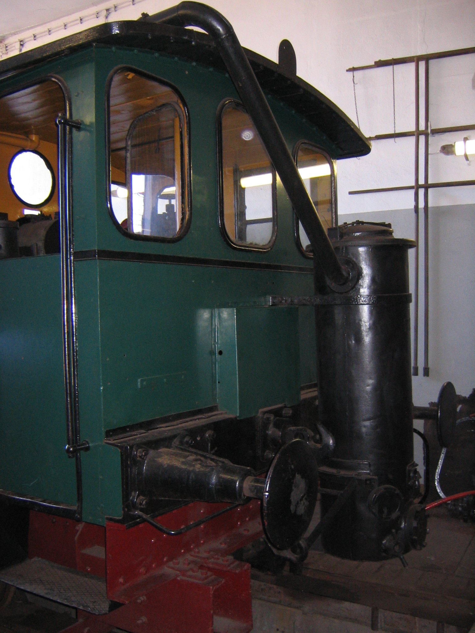 Holzvergaser an Lok Nummer 111 im Bayerischen Eisenbahnmuseum Nördlingen